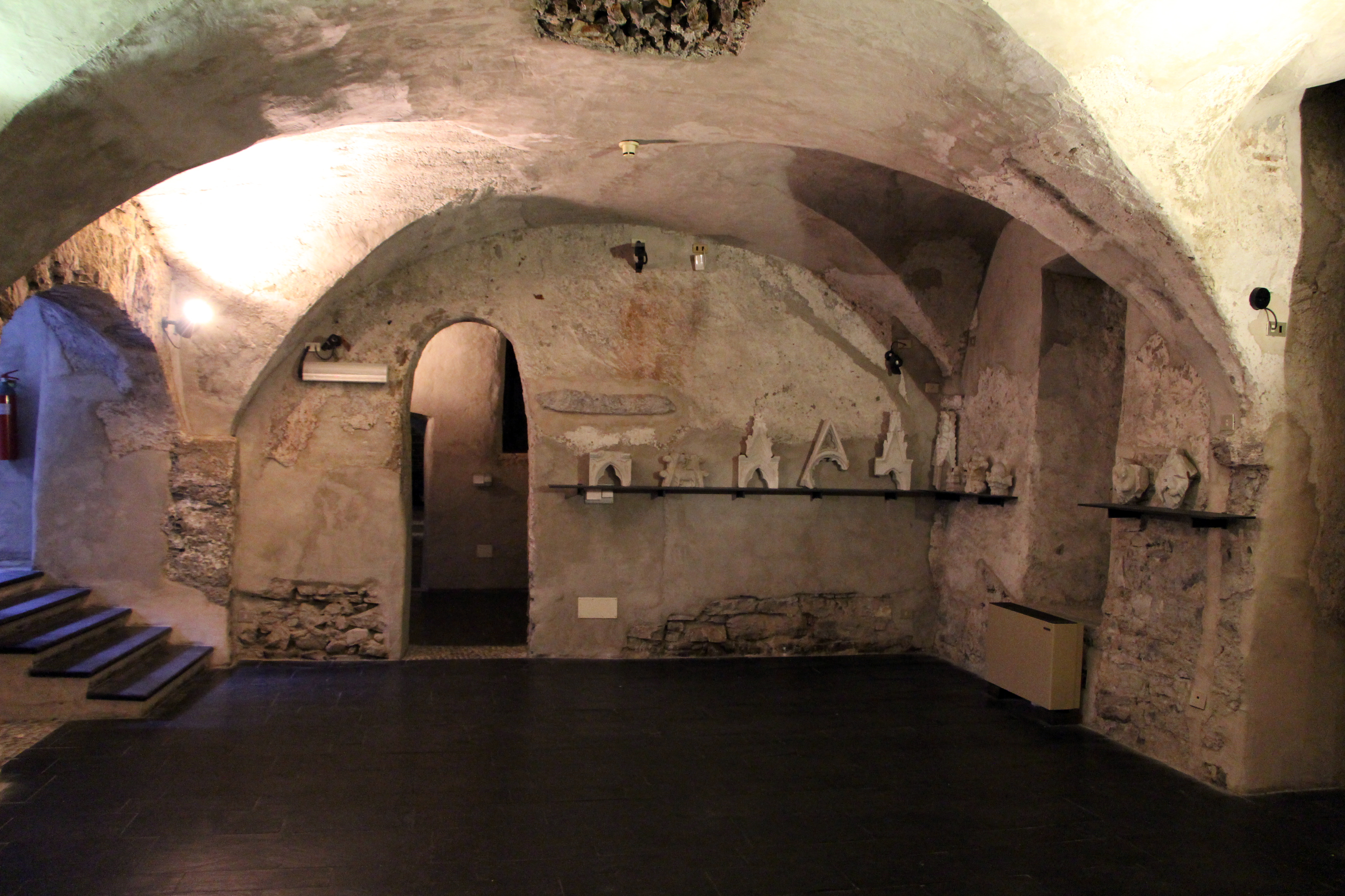 Museo Diocesano (Genoa) The making of this document was supported by Wikimedia CH. (Submit your project!) For all the files concerned, please see the category Supported by Wikimedia CH.